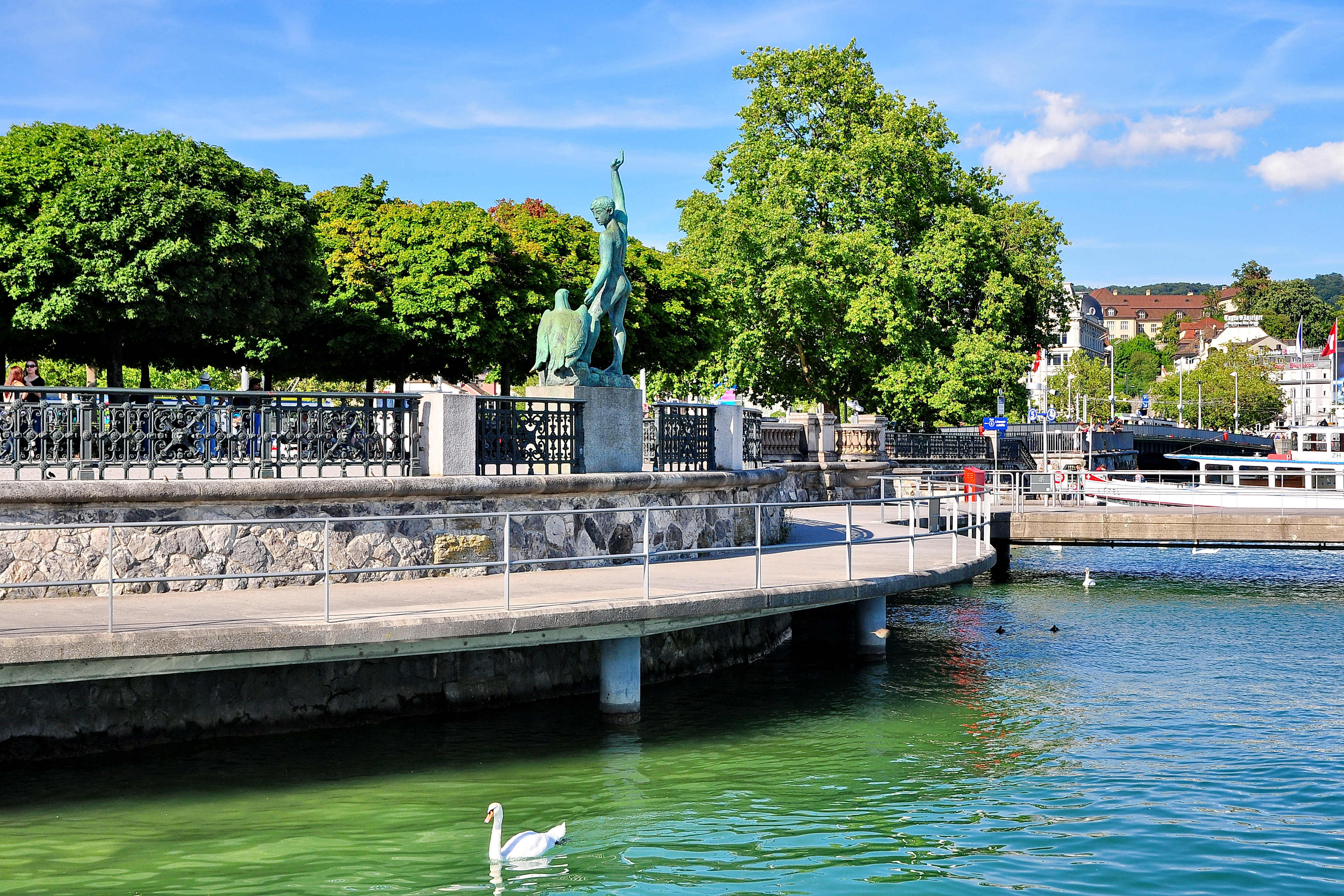 Ganymed, Bürkliplatz in Zürich (Switzerland)